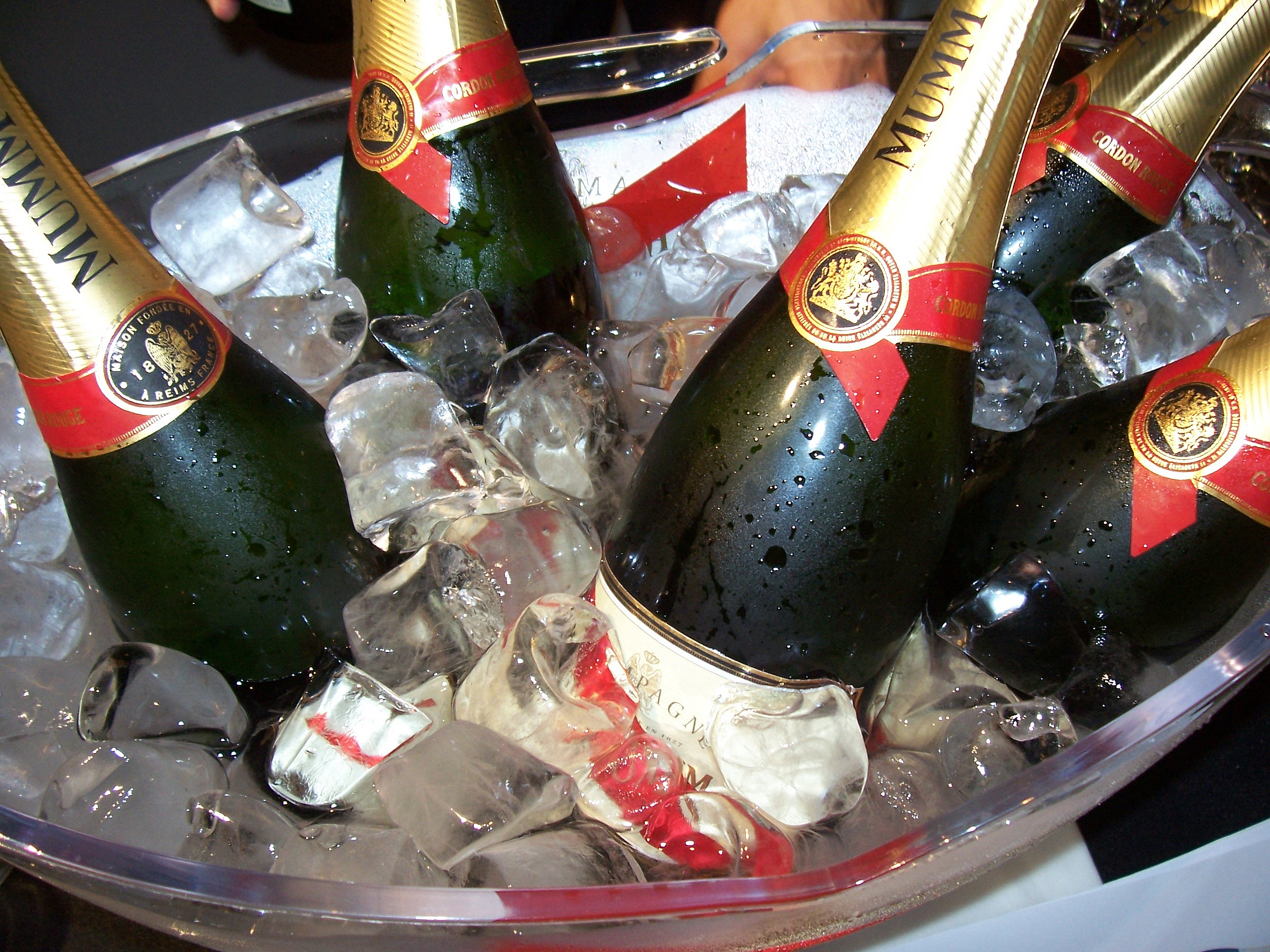 Champagne G. H. Mumm